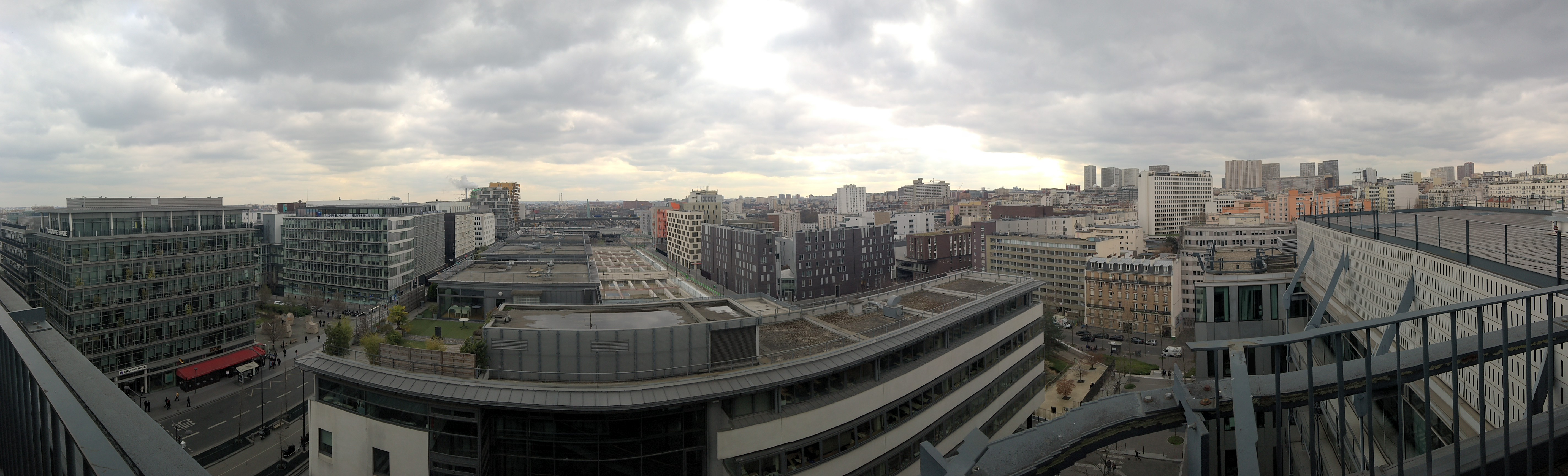 Vue panoramique de l'avenue de France, de la porte de France et des tours Massena depuis un immeuble de l'avenue de France